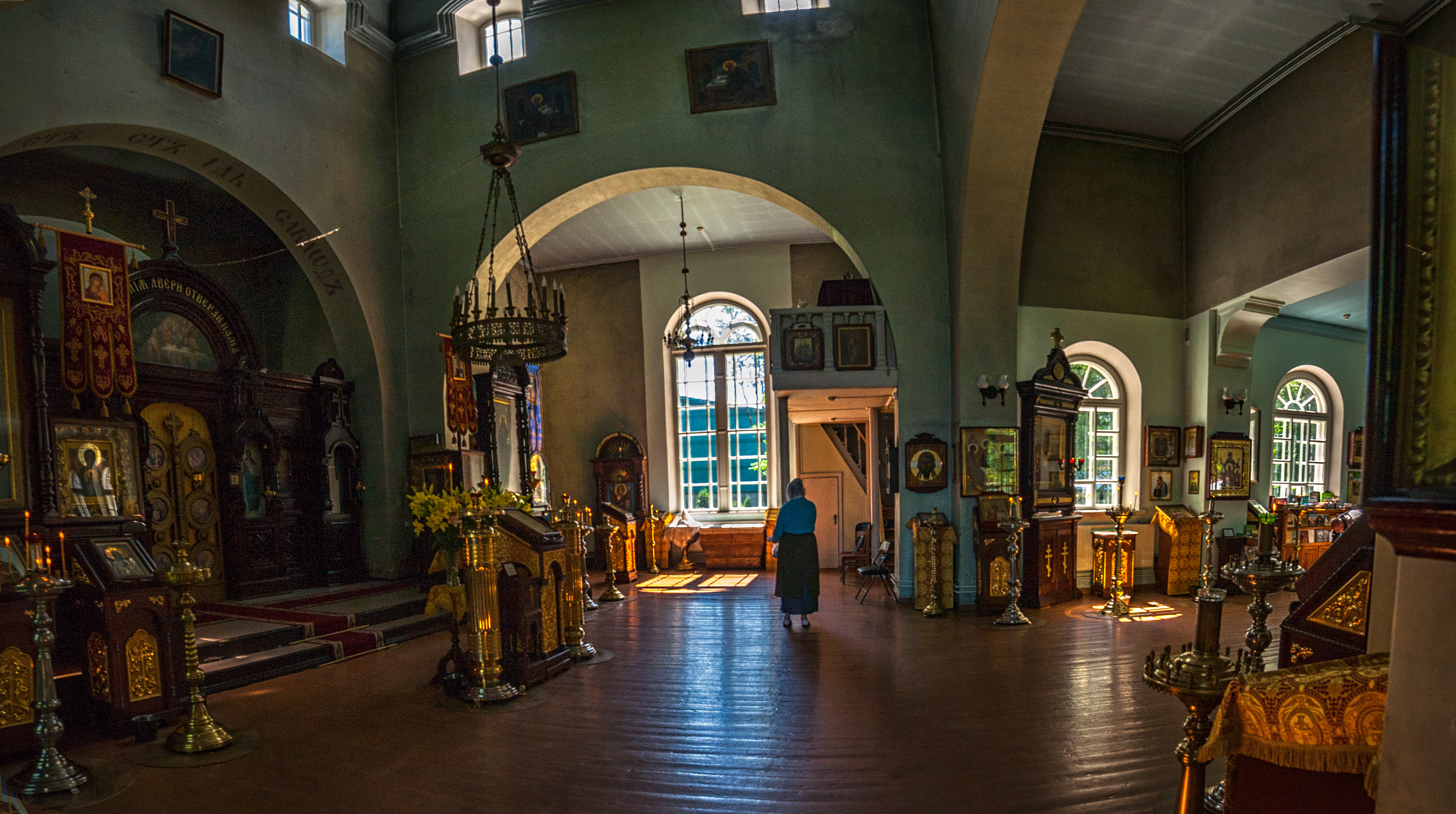 Ventspils Sv.Nikolaja pareizticīgo baznīca, Ventspils, Plosta iela 10